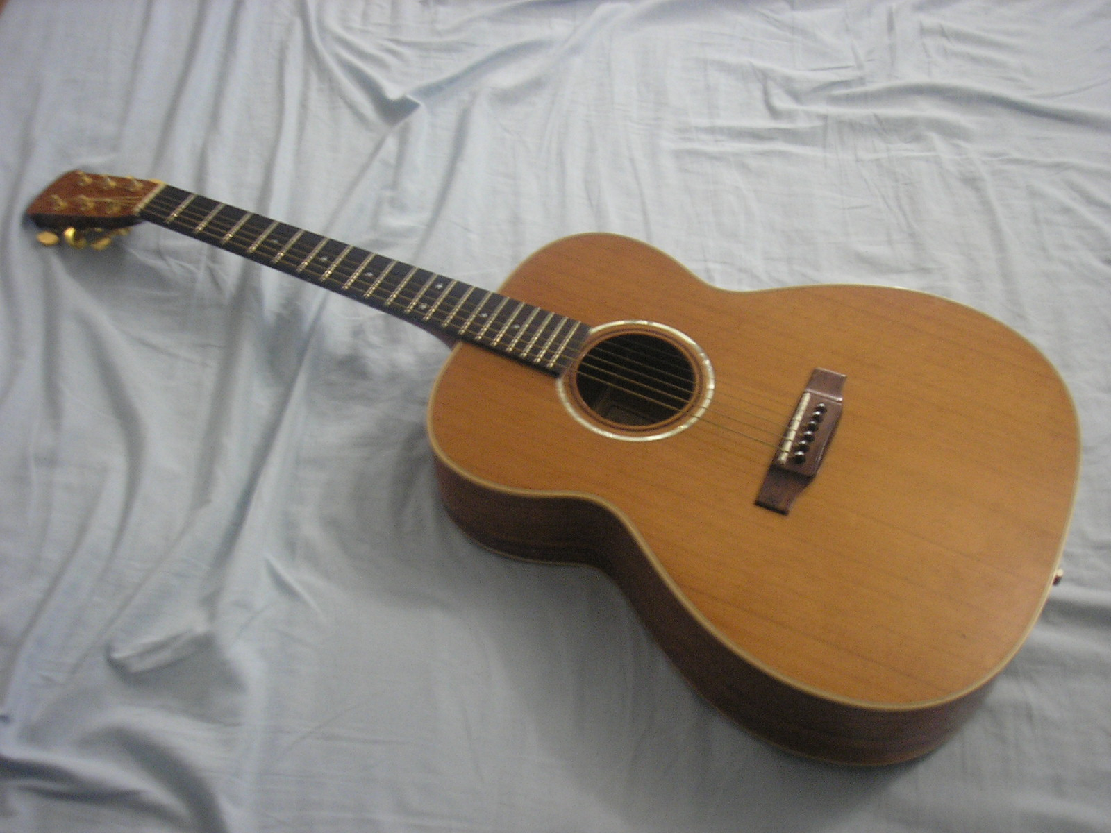 Chitarra acustica Mantra / Acoustic Guitar (Mantra gts.)